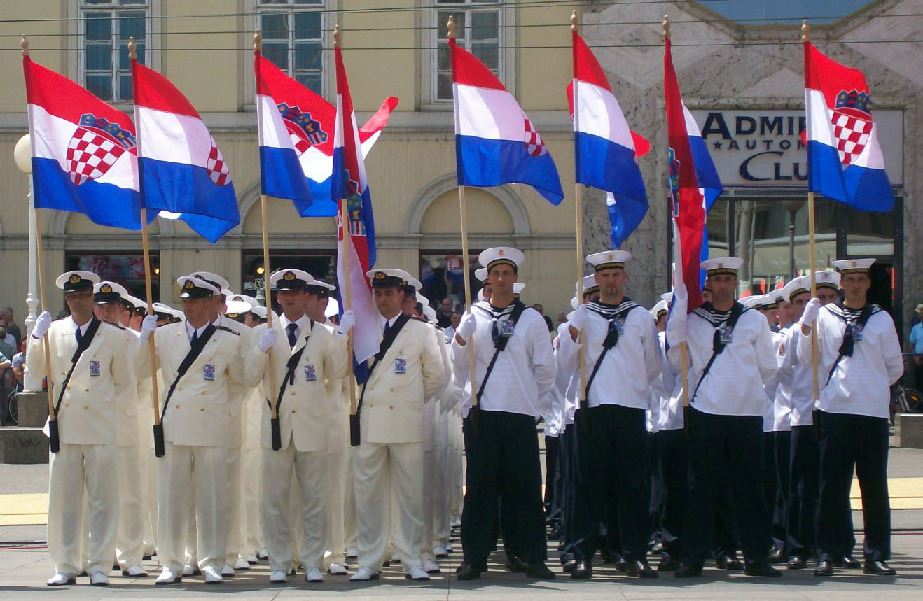 Pripadnici Hrvatske ratne mornarice tijekom svečanog postrojavanja u Zagrebu, 25. lipnja 2008.